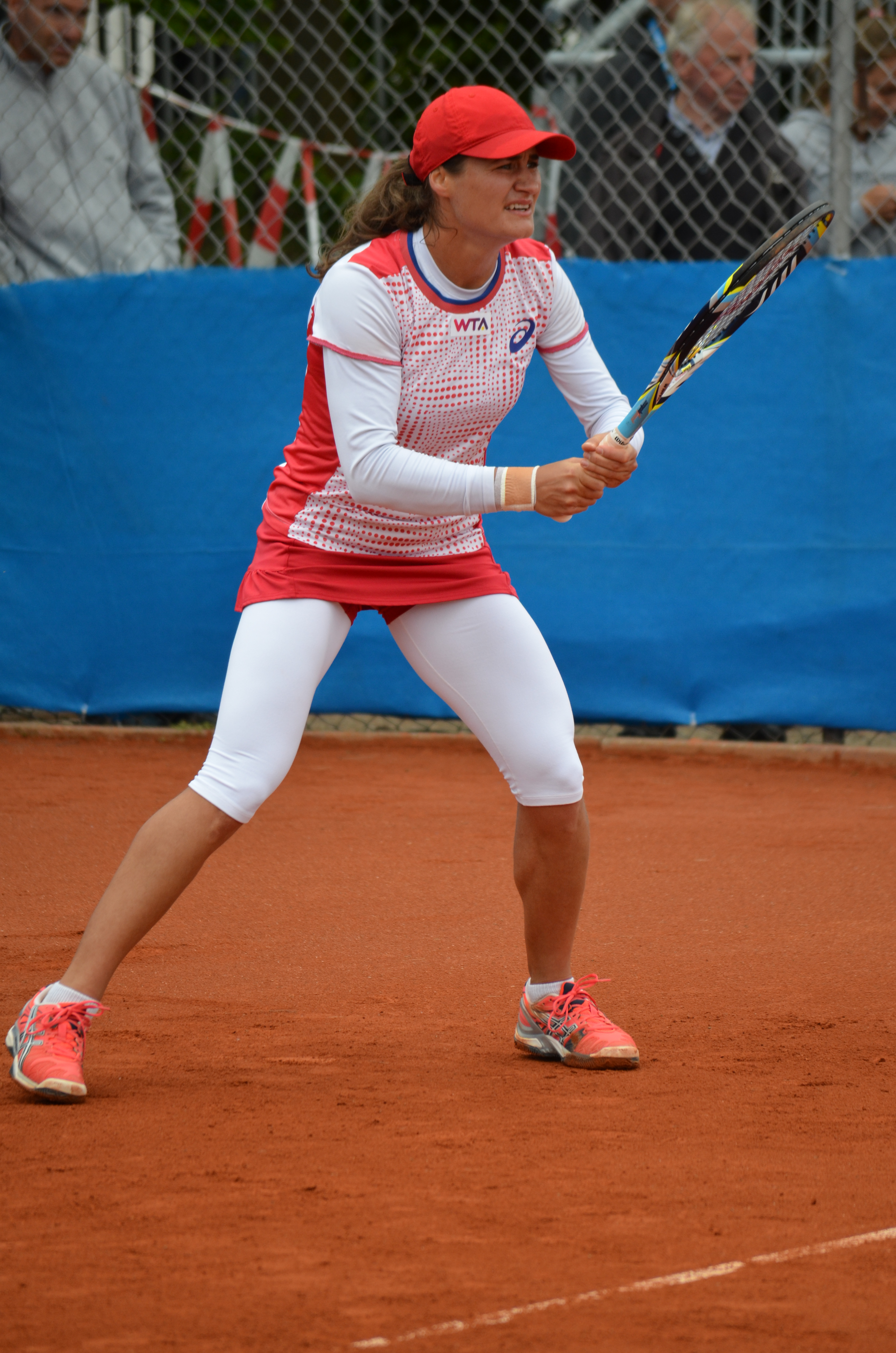 Monica Niculescu in der Erstrundenbegegnung gegen Kurumi Nara beim Nürnberger Versicherungscup 2014